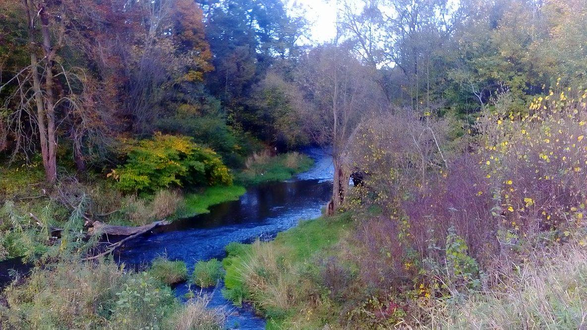 Kaczawa